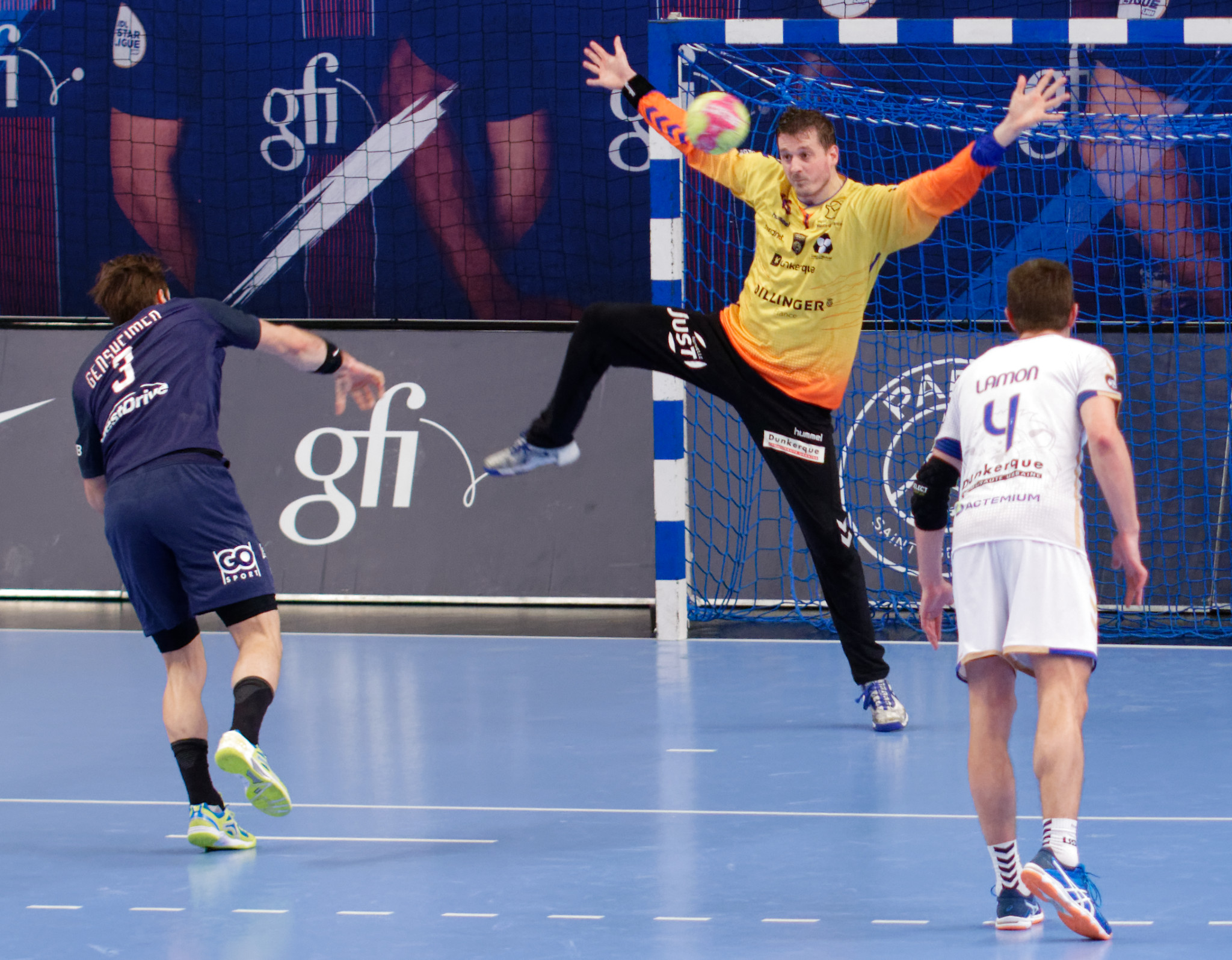 Rencontre de LidlStarligue entre le PSG et l'S Dunkerque. A Coubertin, le 08 mars 2017.